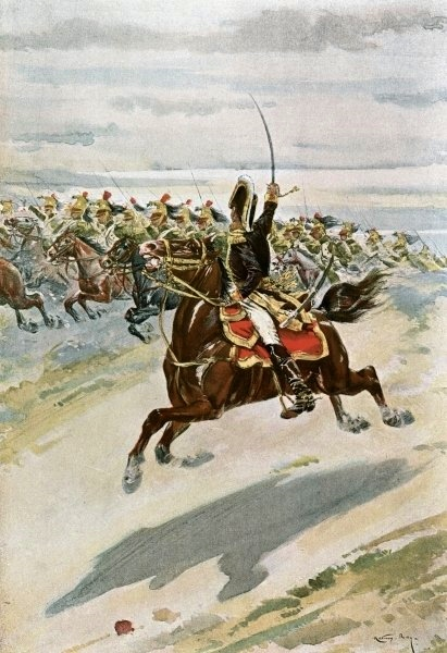 Les dragons de la Garde impériale, 1813. Au premier plan, le général de brigade comte Louis Michel Letort de Lorville, colonel-major du régiment.